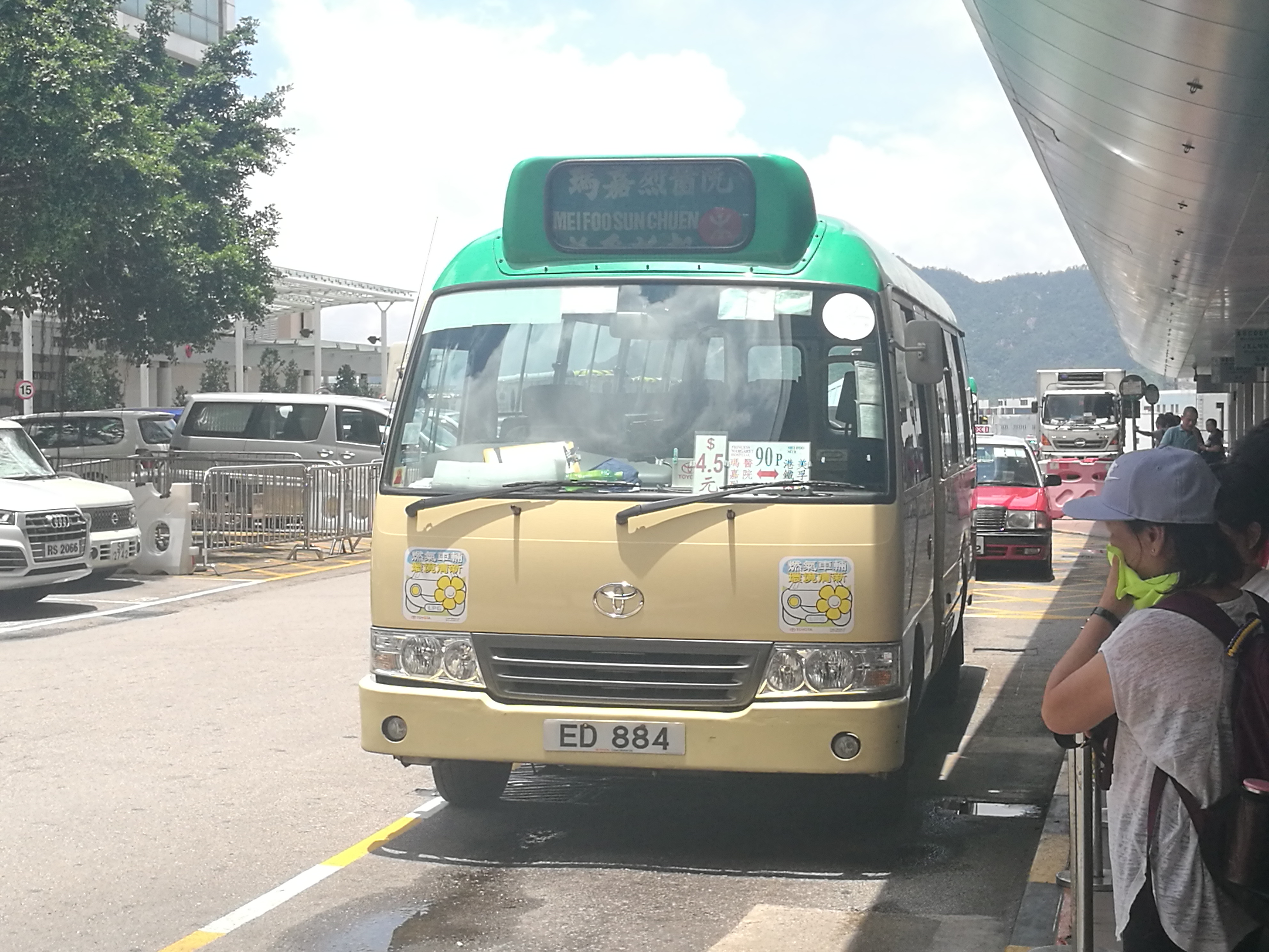 小巴ED884的照片